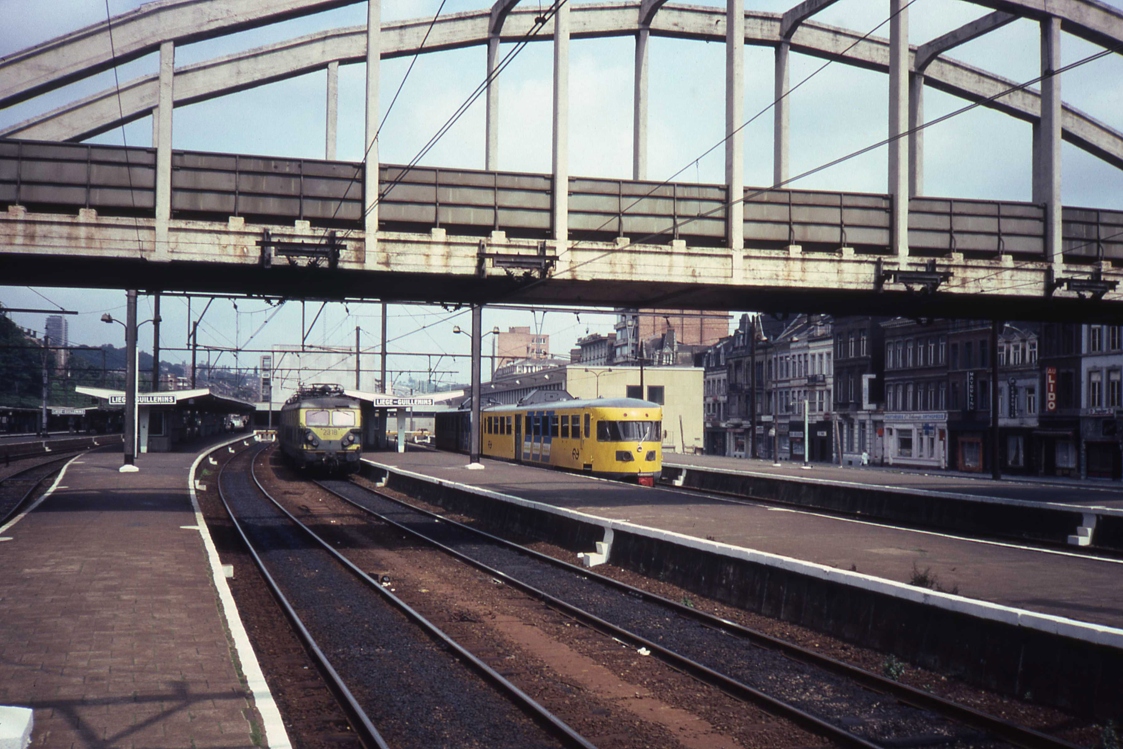 NS plan X dieseltreinstel in Liège-Guillemins vooraf aan de elektrificatie van de lijn naar Maastricht in 1985.